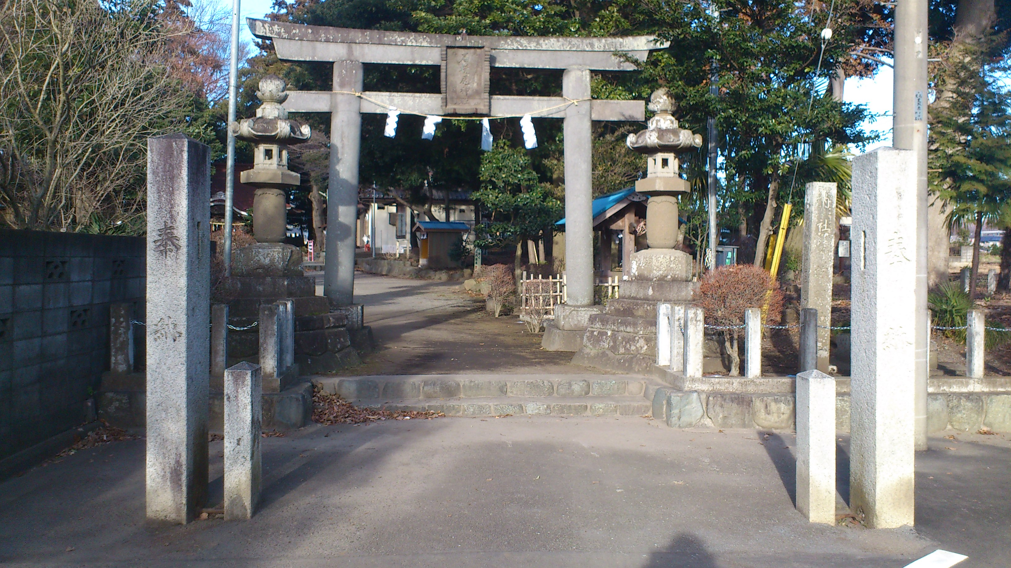 神奈川県相模原市緑区大島にある諏訪神社（大島諏訪明神）の鳥居。